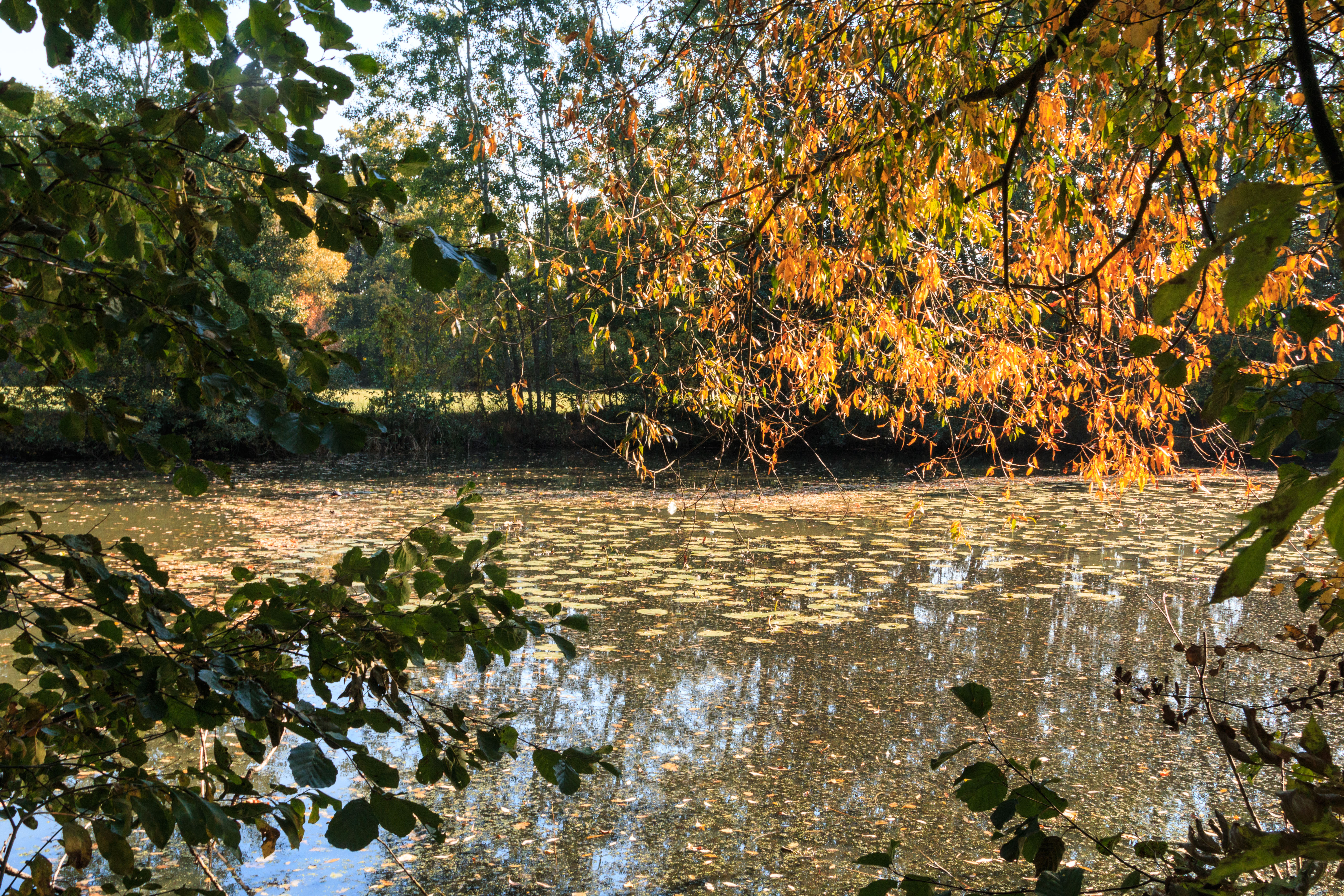 Pekelská jezera - mrtvé rameno Orlice u Hradce Králové Project: Vodstvo.